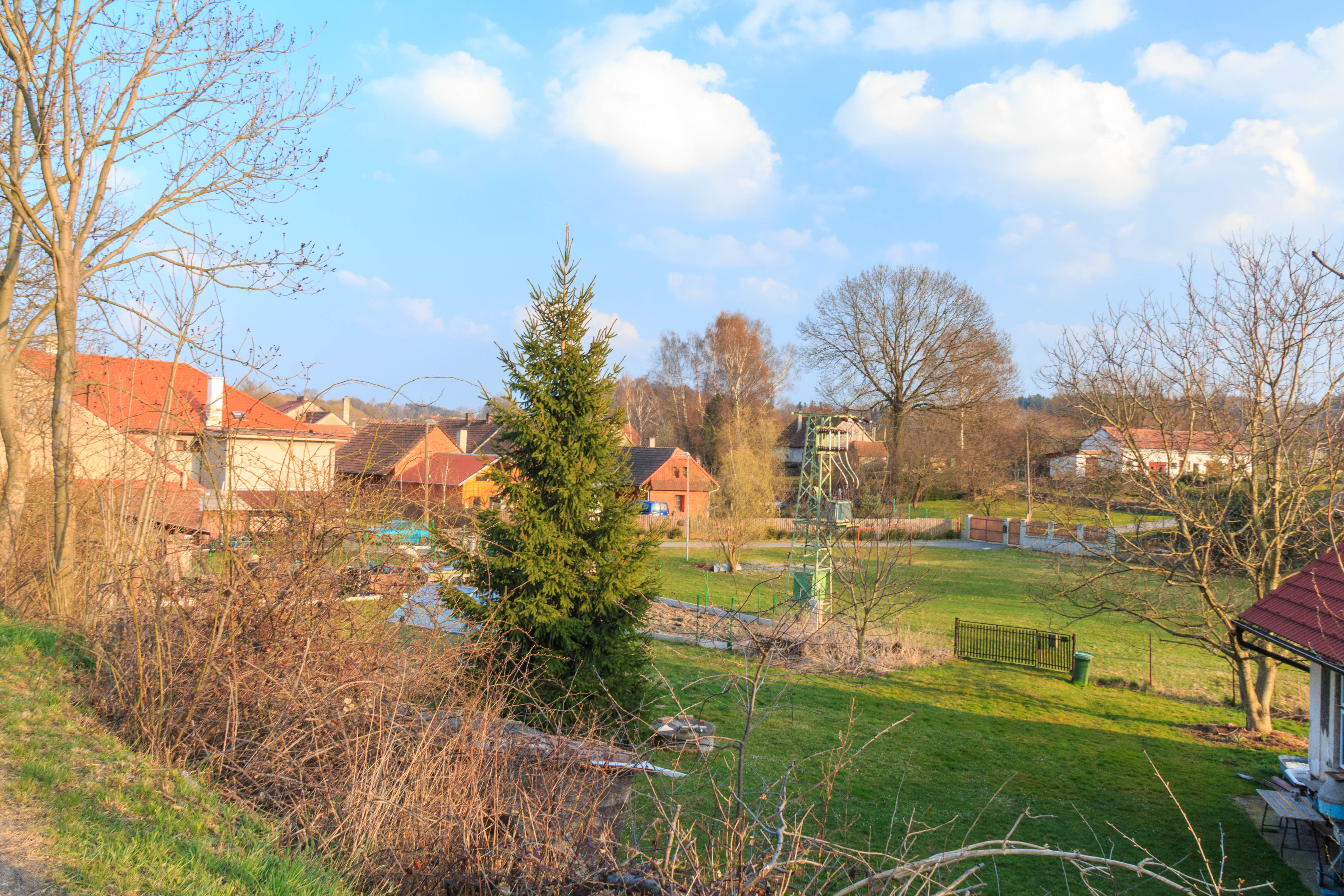 Louka pohled ze silnice do Havlovic